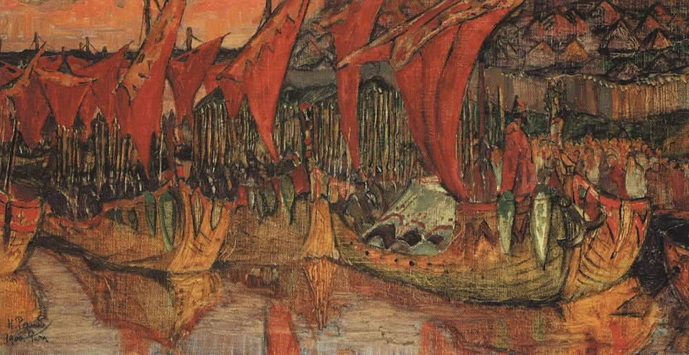 Fleet of Kievan knyaz Vladimir for campaign against Korsun (in 988). «Красные паруса. Поход Владимира на Корсунь. » Н.К. Рерих. Холст, масло. 27x52 см, Государственная Третьяковская галерея, Москва